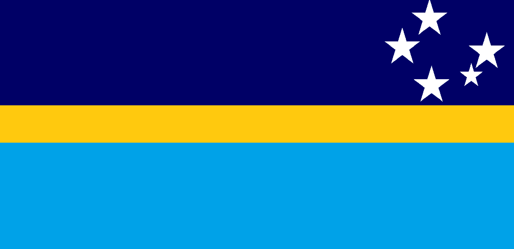 戴维·哈密尔顿的南极洲洲旗设计图案